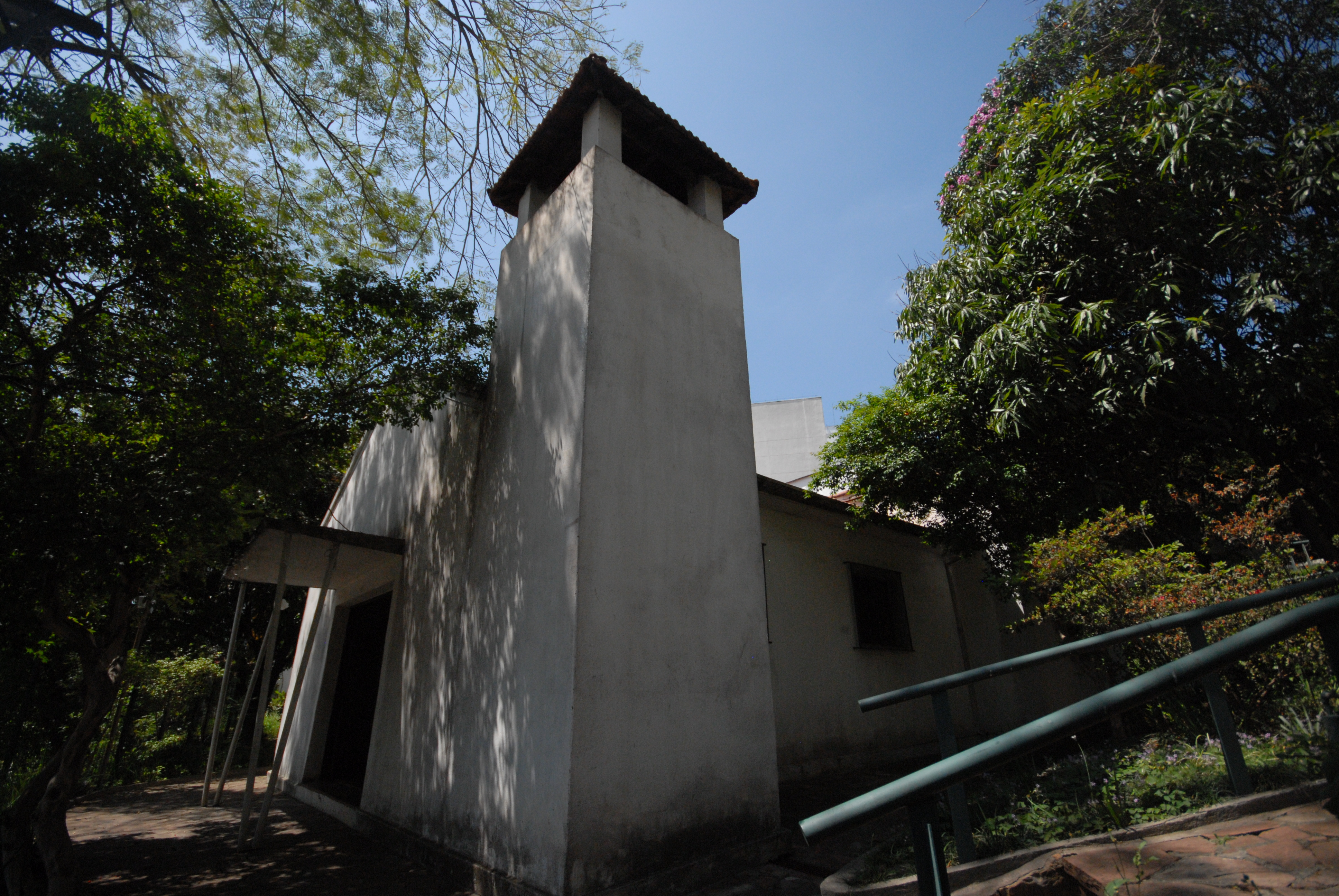 Torre da Capela do Cristo Operário, projetada e desenhada pelo Frei João Batista no estilo campesino